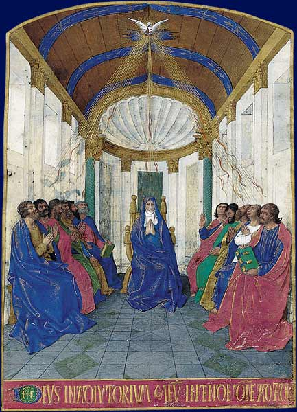 La Pentecôte Heures d'Étienne Chevalier, enluminées par Jean Fouquet Musée Condé, Chantilly, R.-G. Ojeda, RMN / musée Condé, Chantilly Pour Jean Fouquet, le blanc a une forte signification de pureté et de purification. Ainsi, la Pentecôte est située dans un cénacle à l'italienne en camaïeu blanc, avec des pilastres antiques, des fenêtres rectangulaires et une abside à coquille. La voûte en berceau surbaissé, en bois, est d'une conception française. Un blanc particulièrement éclatant attire le regard vers le Saint-Esprit, la guimpe de la Vierge et le jeune apôtre, saint Jean, assis à droite.